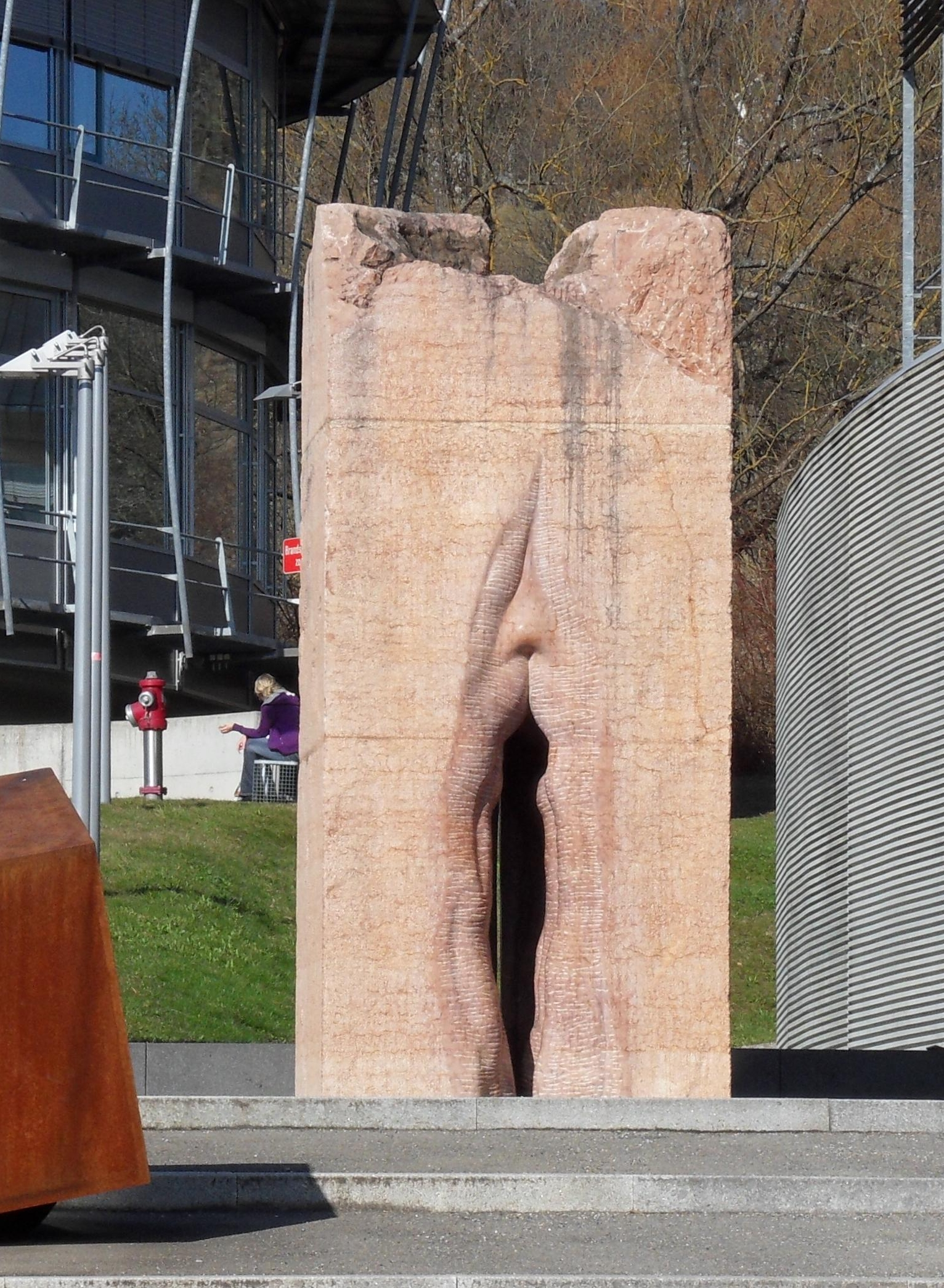 Skulptur einer Vulva vor dem Institut für Mikrobiologie des Uniklinikums Tübingen